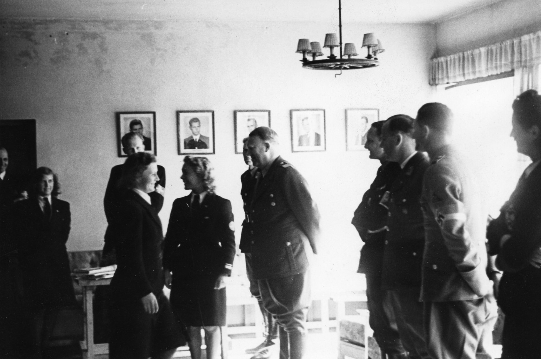 RA/PA-1209/Ue 97/ img097 Nasjonal Samling, forkortet NS, var et norsk politisk parti som ble grunnlagt av Vidkun Quisling i 1933 og ble oppløst ved frigjøringa i 1945. Ideologisk fulgte partiet den tyske nasjonalsosialismen tett, og NS ble støtteorganisasjon for den tyske okkupasjonsmakta i Norge under andre verdenskrig.